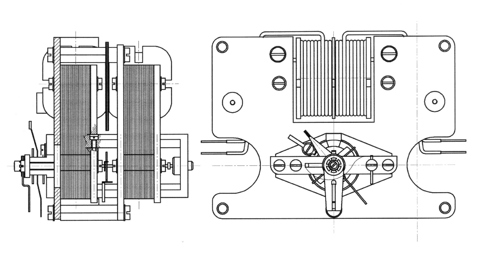 Kétrendszerű ferrodinamikus műszer olajcsillapítással